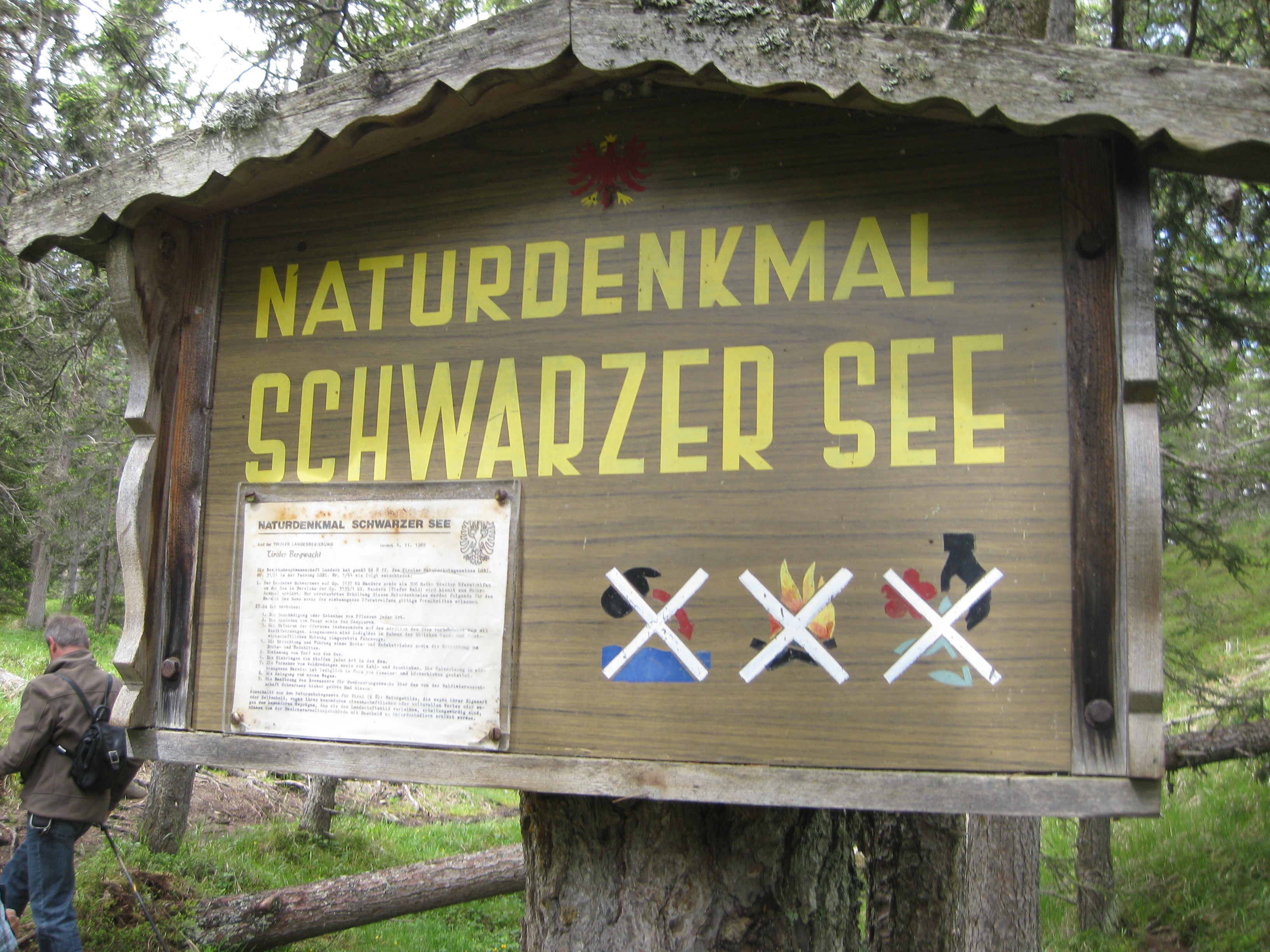 Der "schwarze See" in der Nähe von Nauders am Reschenpass. Das dazugehörige Schild.